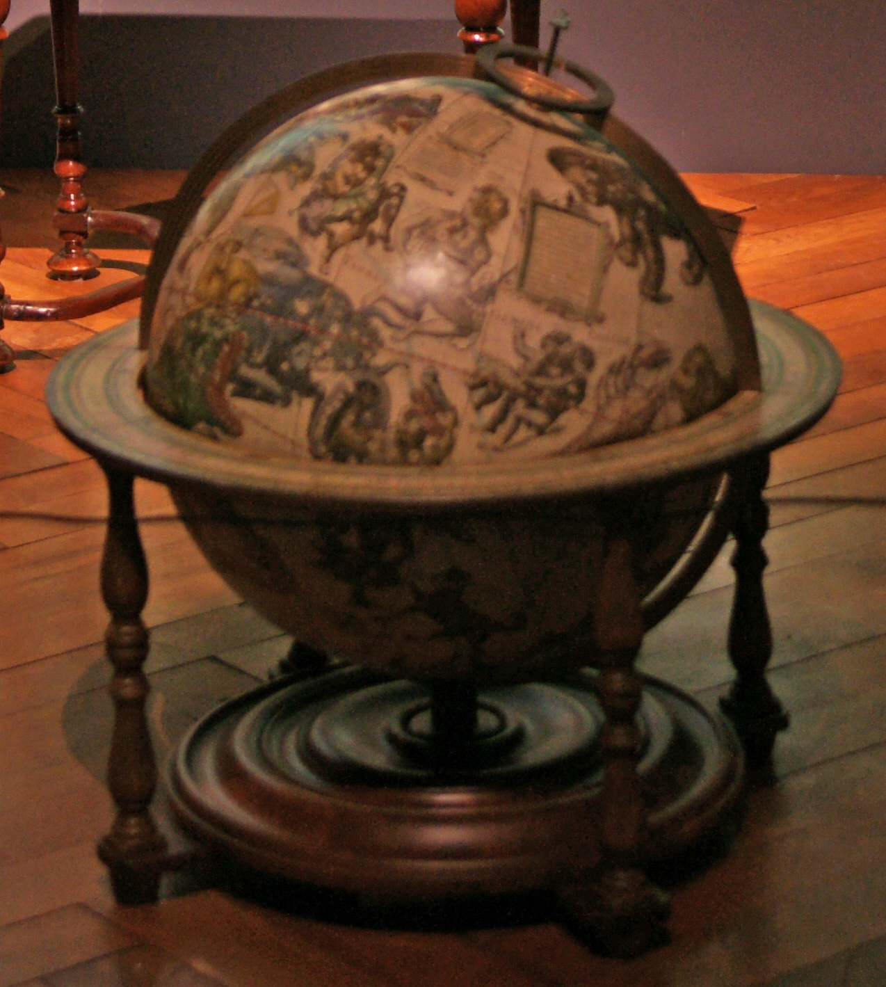 Particolare di File:HMB Bern New Bern - Family situation at Worb Castle.jpg